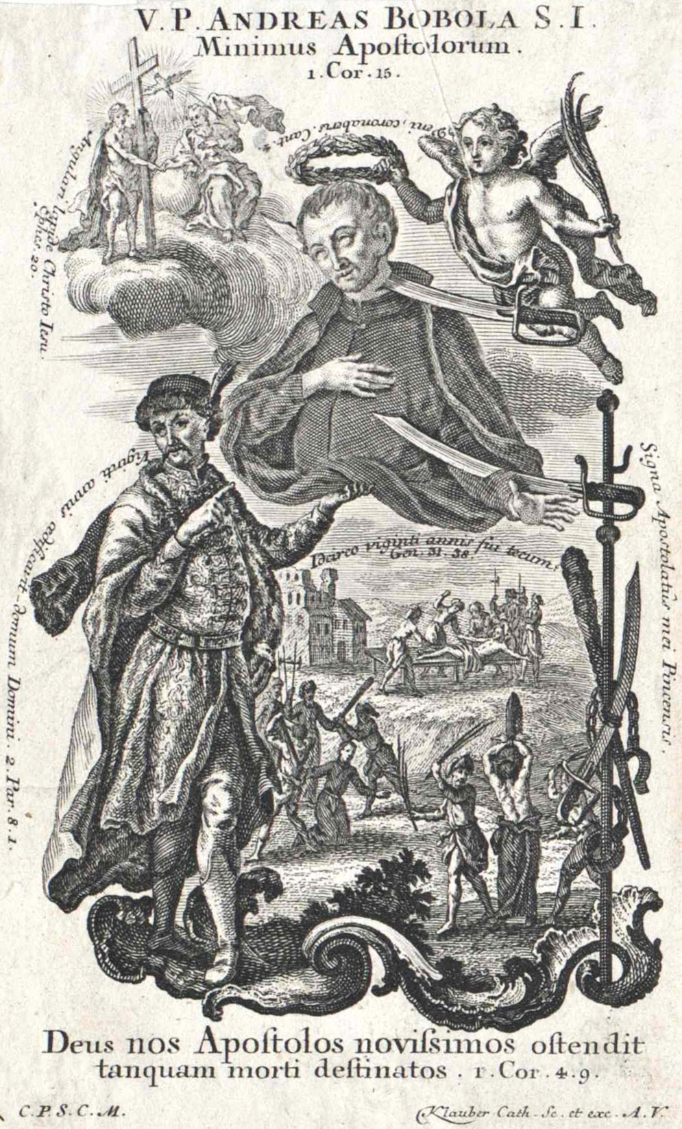 Andreas Bobola, Andachtsbildchen mit Martyrium des Heiligen